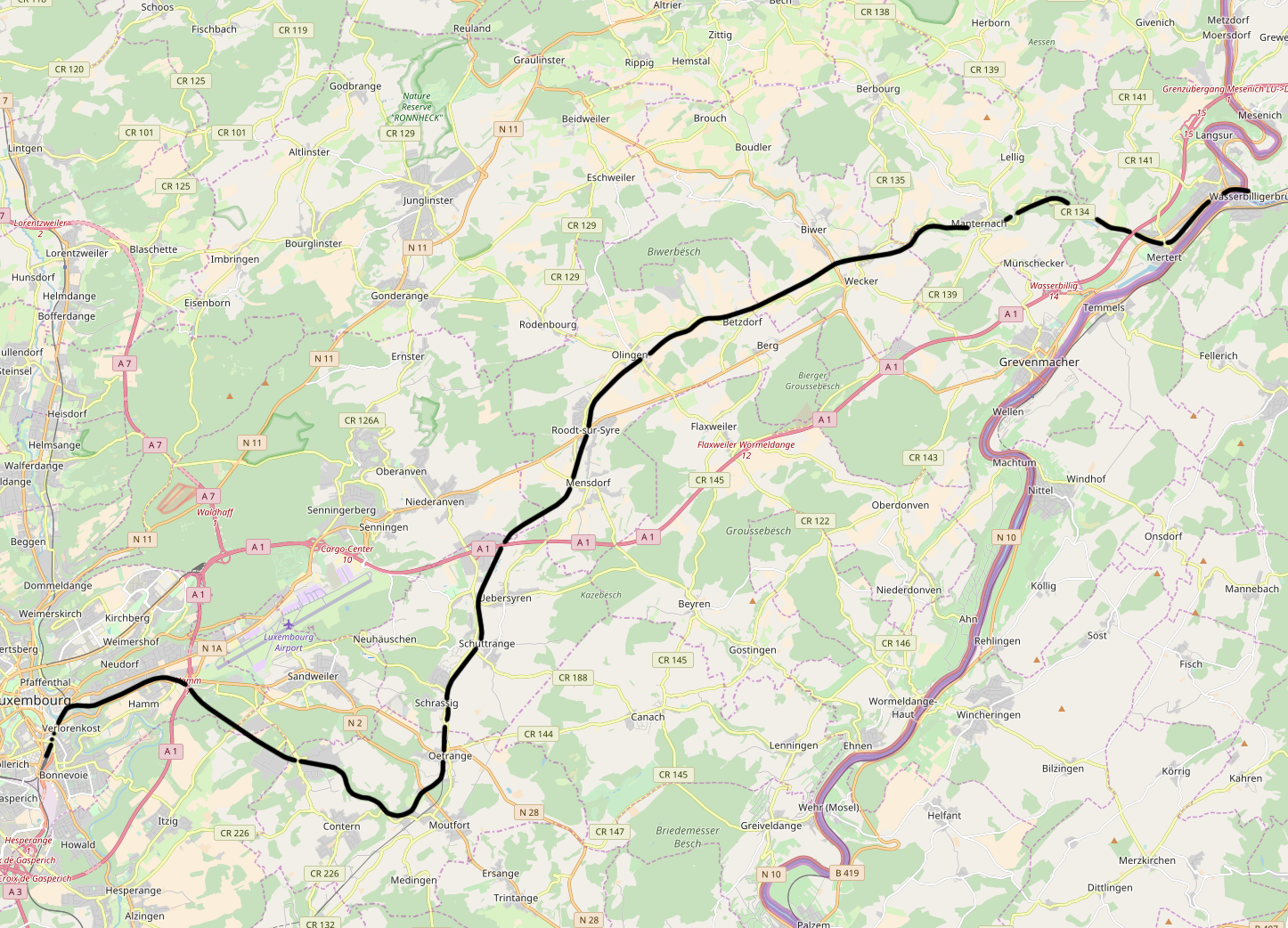 CFL line 3, Luxembourg - Wasserbillig